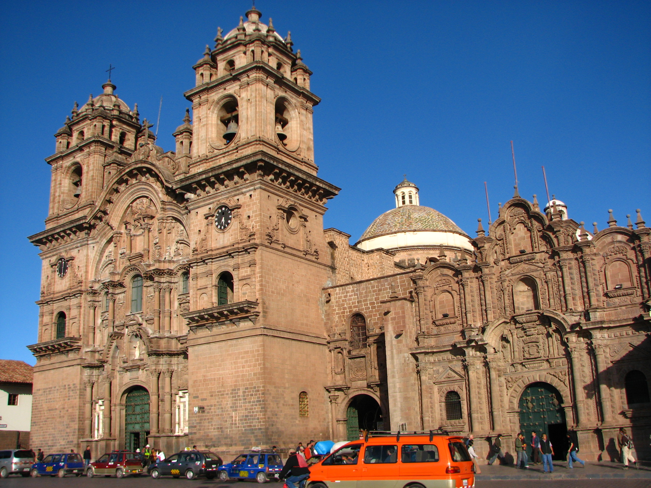 Compañía de Jesus (Cusco)